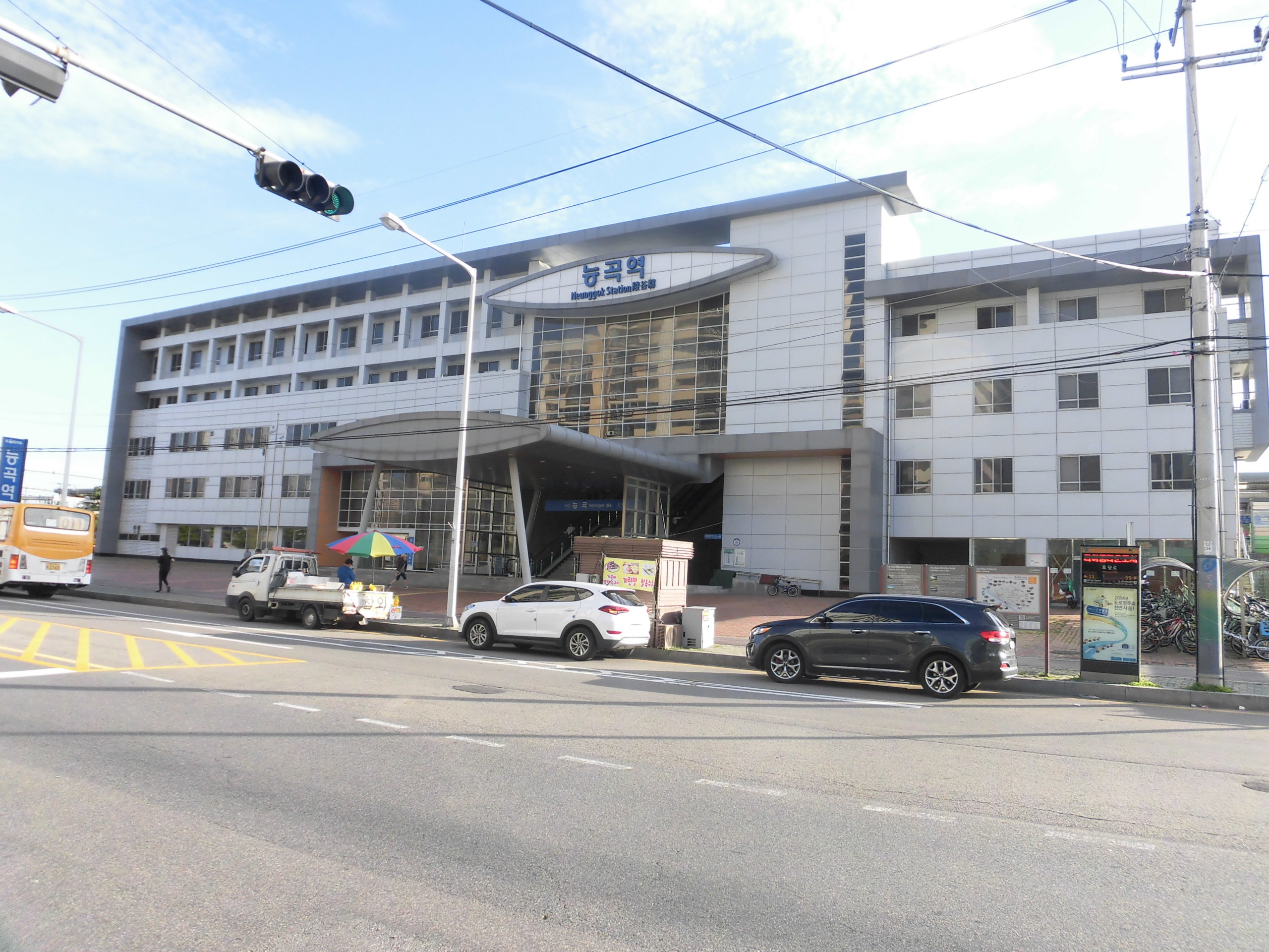 경기도 고양시에 있는 능곡역